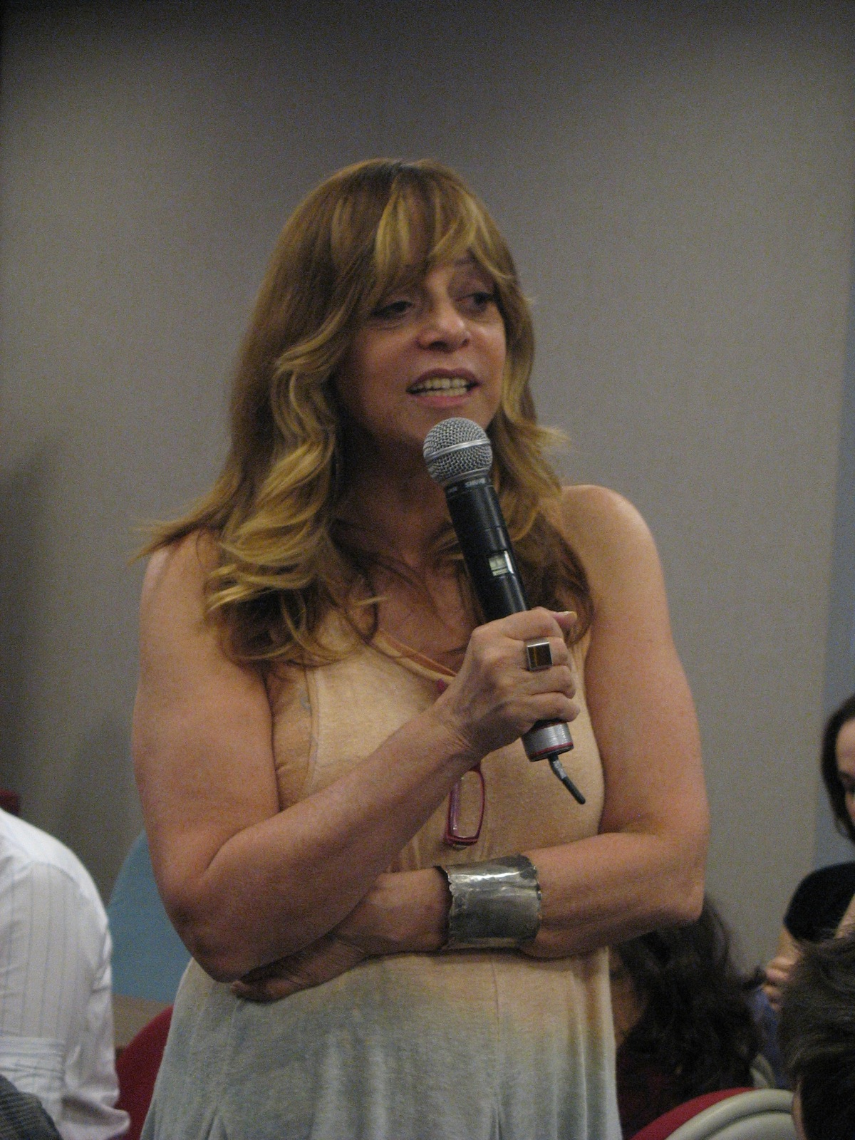 Gloria Perez na apresentação a Blogueiros da telenovela WCaminho das Índias".